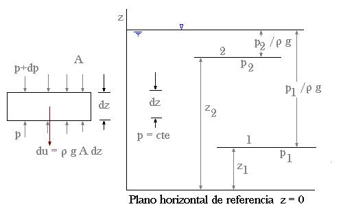 Autor: Alfredobi Fecha: abril 2006